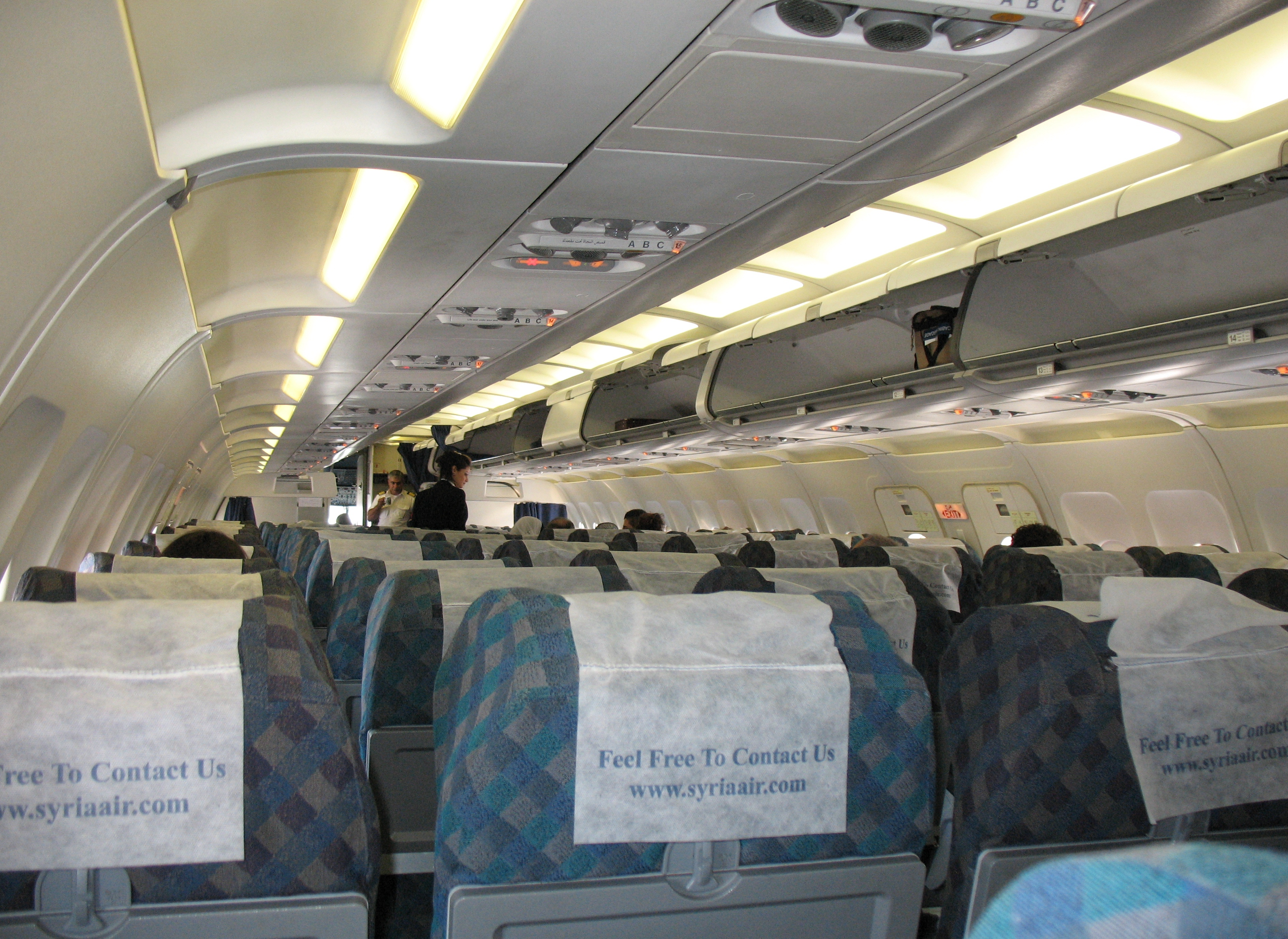 Innengestaltung im Flieger der Gesellschaft "Syrian Arab Airlines"